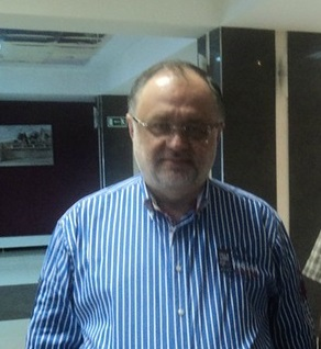 Али Вячеслав Сергеевич Полосин (род. 26 июня 1956, Москва, СССР) — российский исламский богослов и общественный деятель.